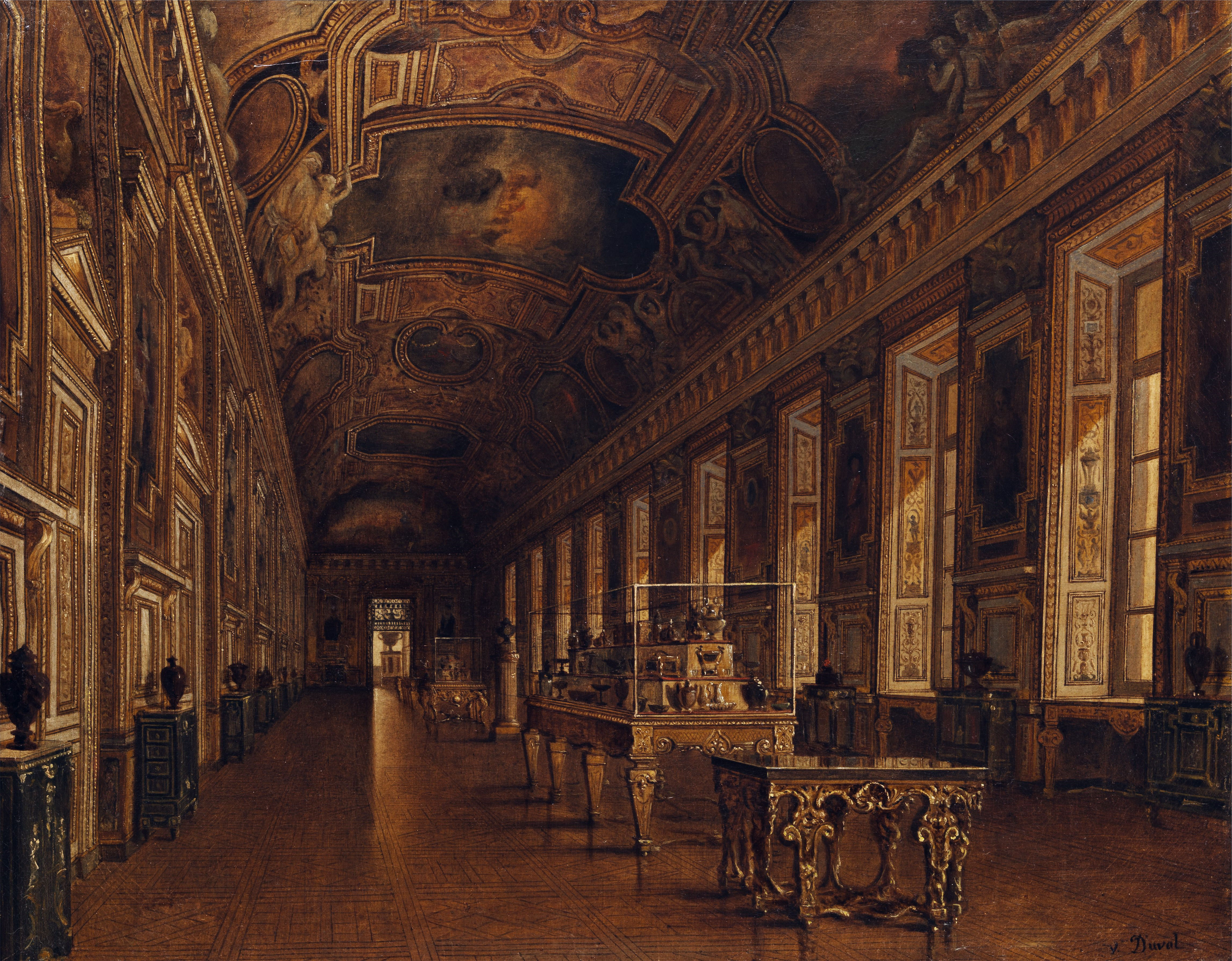 Inneres der Apollo-Galerie im Louvre, Öl auf Leinwand, 63 x 79 cm, rechts unten signiert